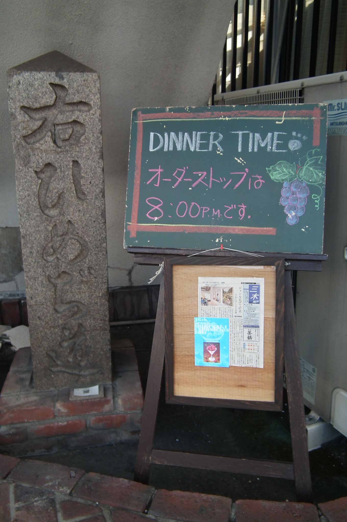 三木市本町二丁目 ひめじ道石碑 Honmachi2-Miki Old signposts in Japan